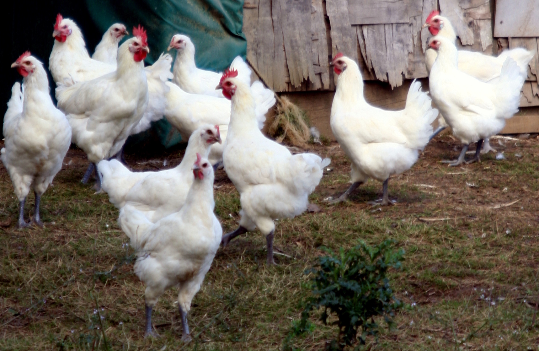 Bressehühner aus der Züchterei in Torpes